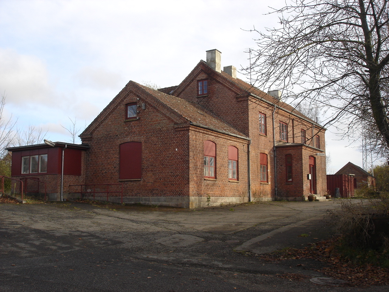 Laurbjerg Station fra V